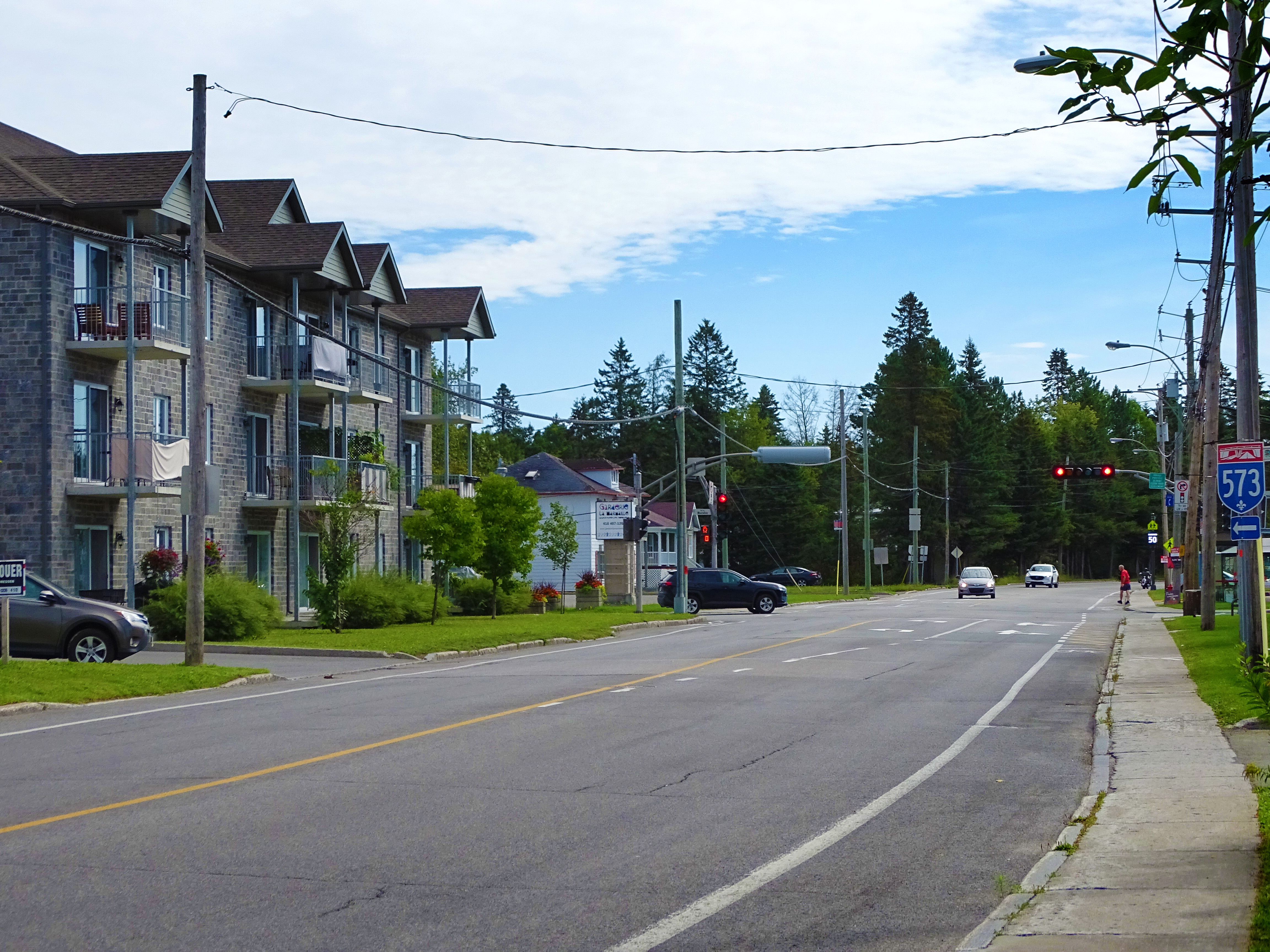 Boulevard Pie-XI, près de l'intersection avec la rue de Montolieu